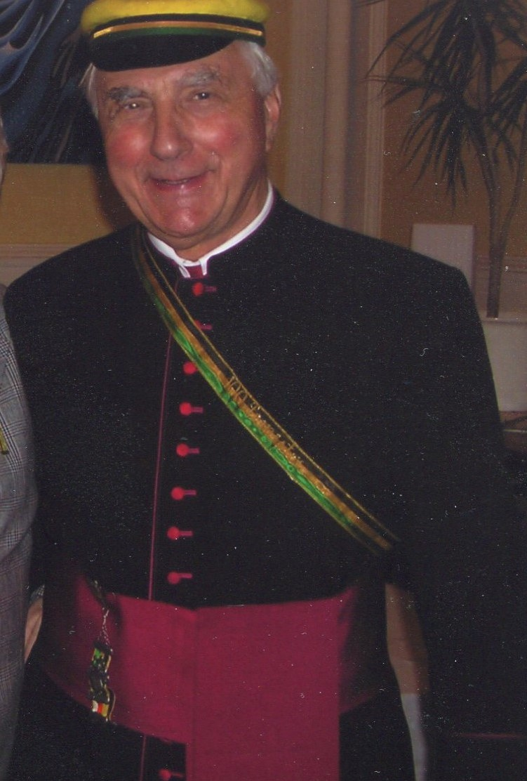 Mütze und Band mit den Farben der KDStV Alemannia Greifswald und Münster werden hier von Prälat Nikolaus Wyrwoll anlässlich eines Festes in Münster getragen